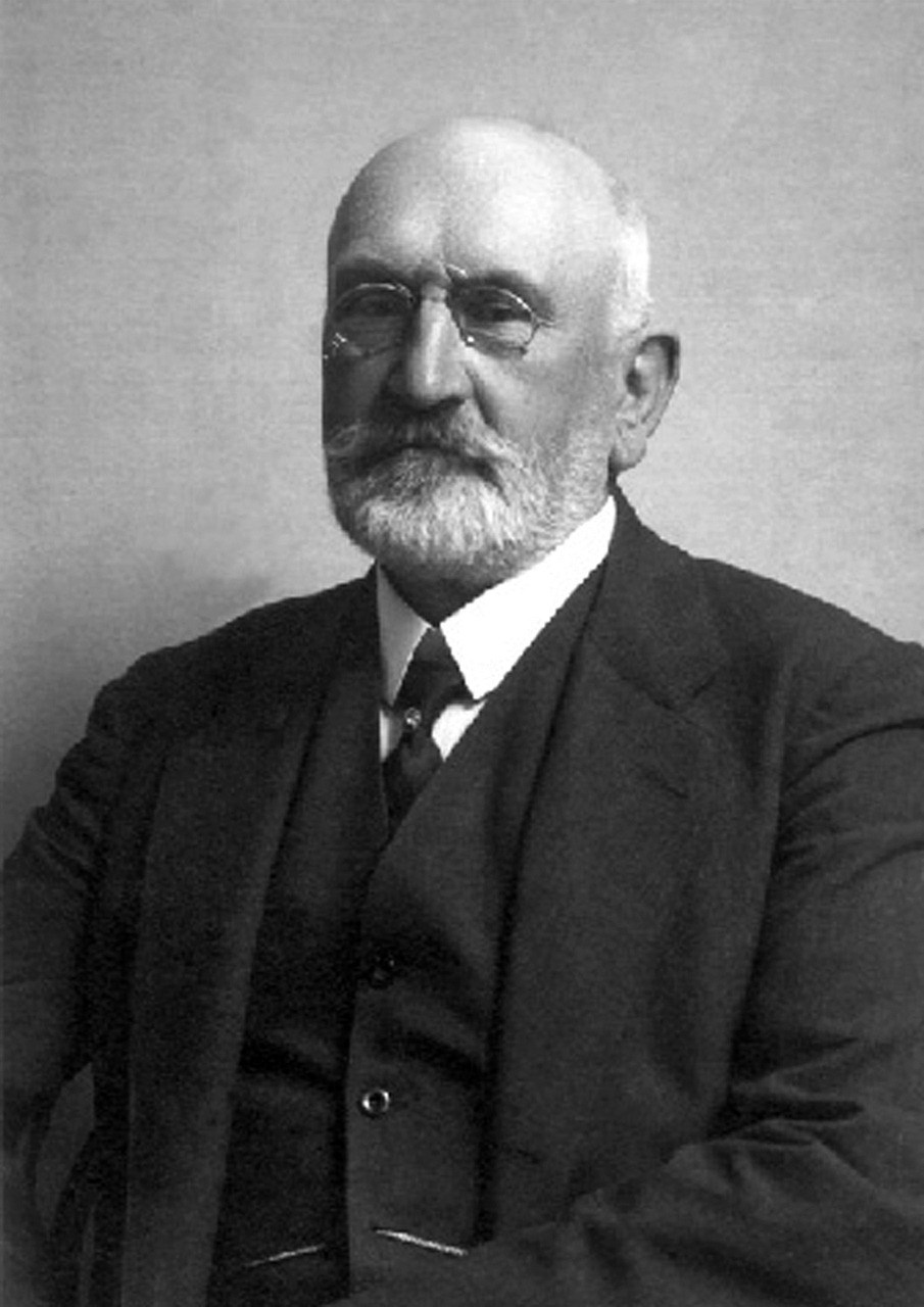 Професор Володимир Шухевич (Володимир Шухевич (1849–1915) : біобібліогр. покажч. : у 2 ч. – Львів, 2004. – 204 с. – (Українська біобібліографія. Нова серія; Чис. 18, ч. 2)